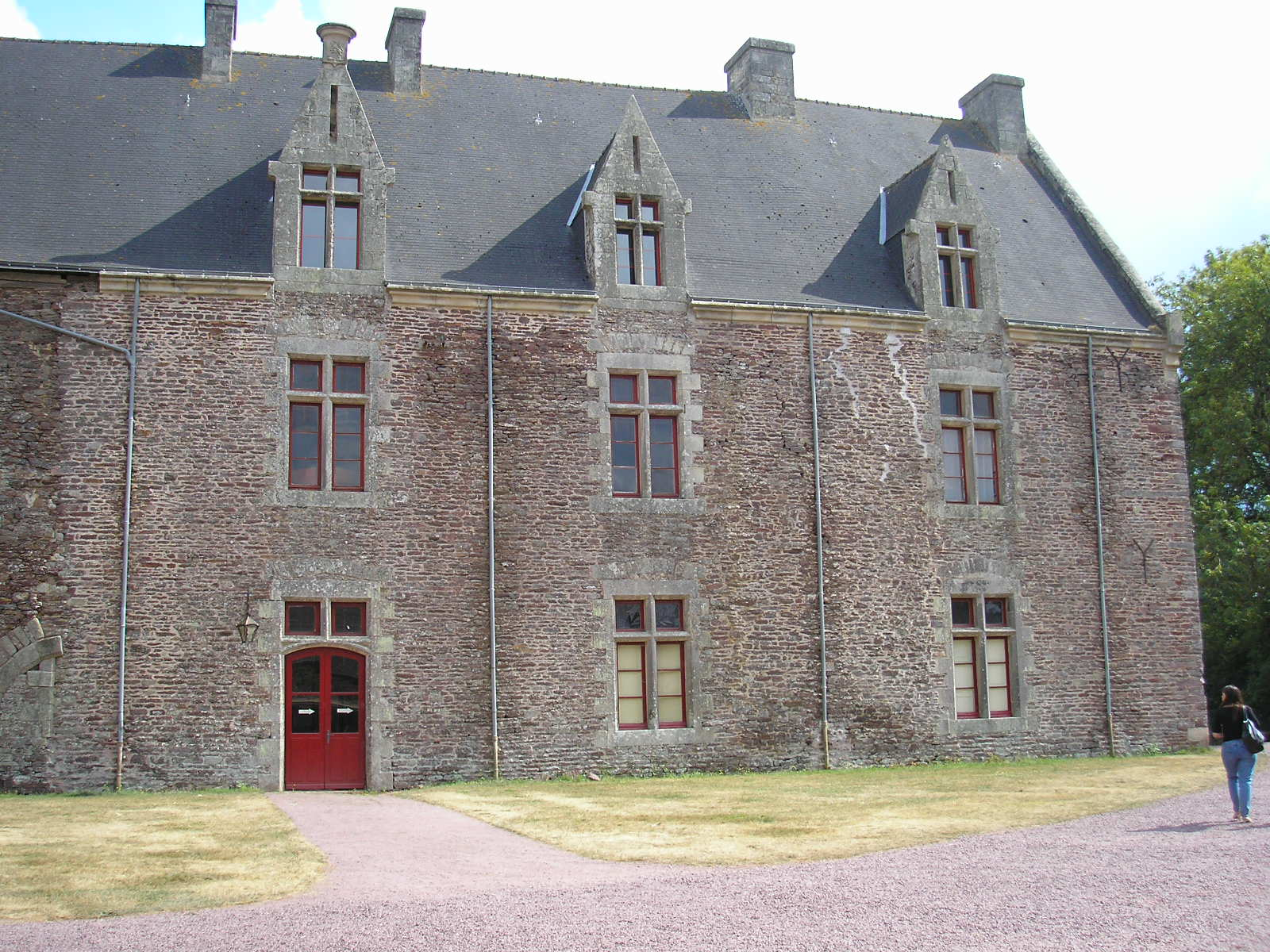 Le Château de Comper, Forêt de Brocéliande.